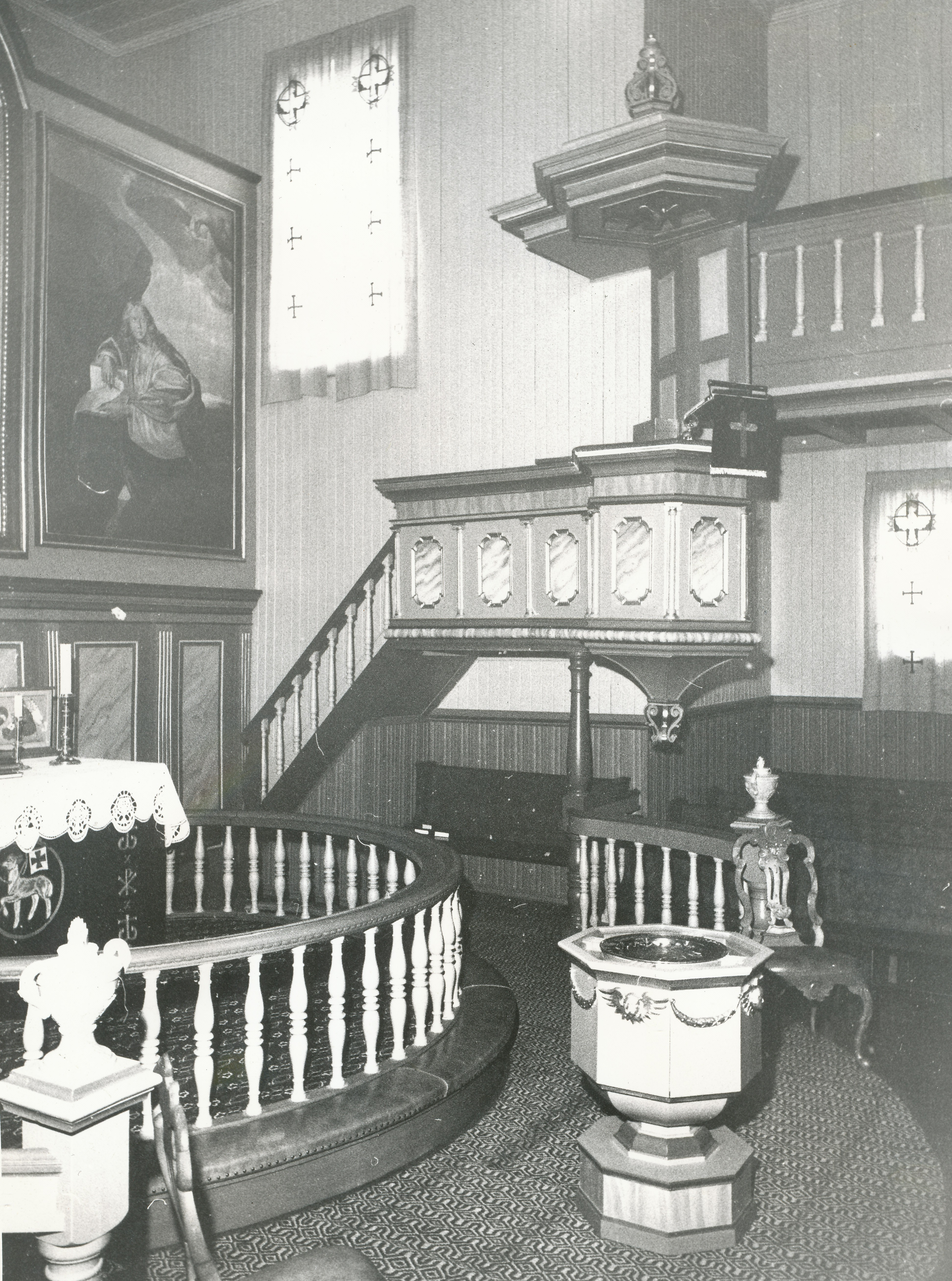 Bratsberg kirke i Strinda; bilde tatt innvendig 24.03.1966. Kirken oppført 1850 av arkitektene Hans Ditlev Franciscus von Linstow (1787 - 1851) og Ole Henriksen. Innviet av biskop Hans Jørgen Darre 4. desember samme år. Fotograf: Monrad Kjellby